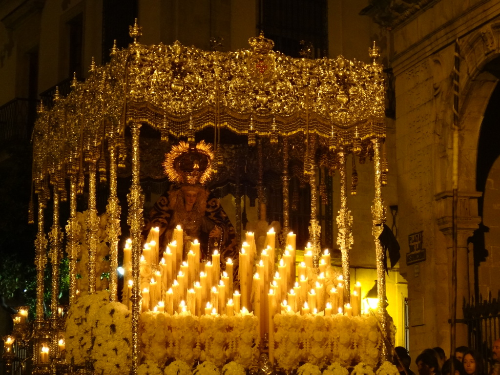 Hermandad de la Santa Cena el Lunes Santo del año 2015 en Jerez de la Frontera (Andalucía, España) This is a photography of a Folklore festival in Spain (Wikidata id Q6124533).